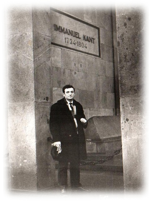 Жыццё Беларуская (тарашкевіца): Віктар Дарашкевіч